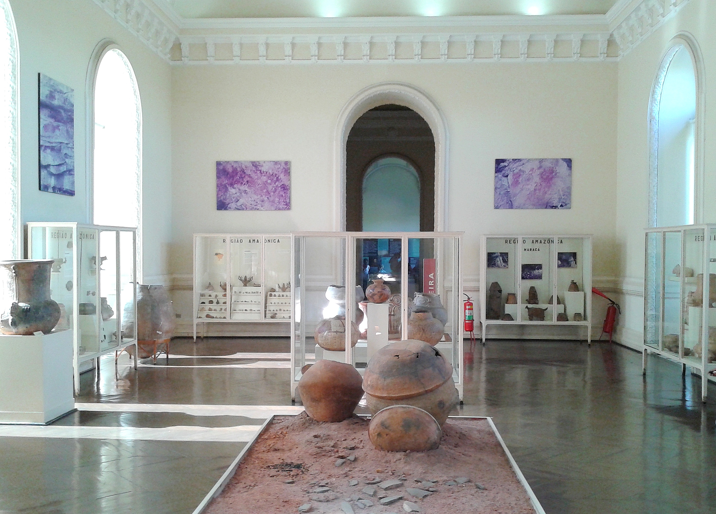 Sala de exposição do acervo de arqueologia brasileira do Museu Nacional/UFRJ, Rio de Janeiro.